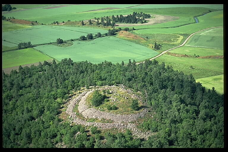 Fornborg vid Storån (Långhundraleden). Dämmet vid Vallby och Broborg. Motiv: Broborg Nyckelord: Flygbilder, Riksintressen Kategori: FornborgFornborg vid Storån (Långhundraleden). Dämmet vid Vallby och Broborg.